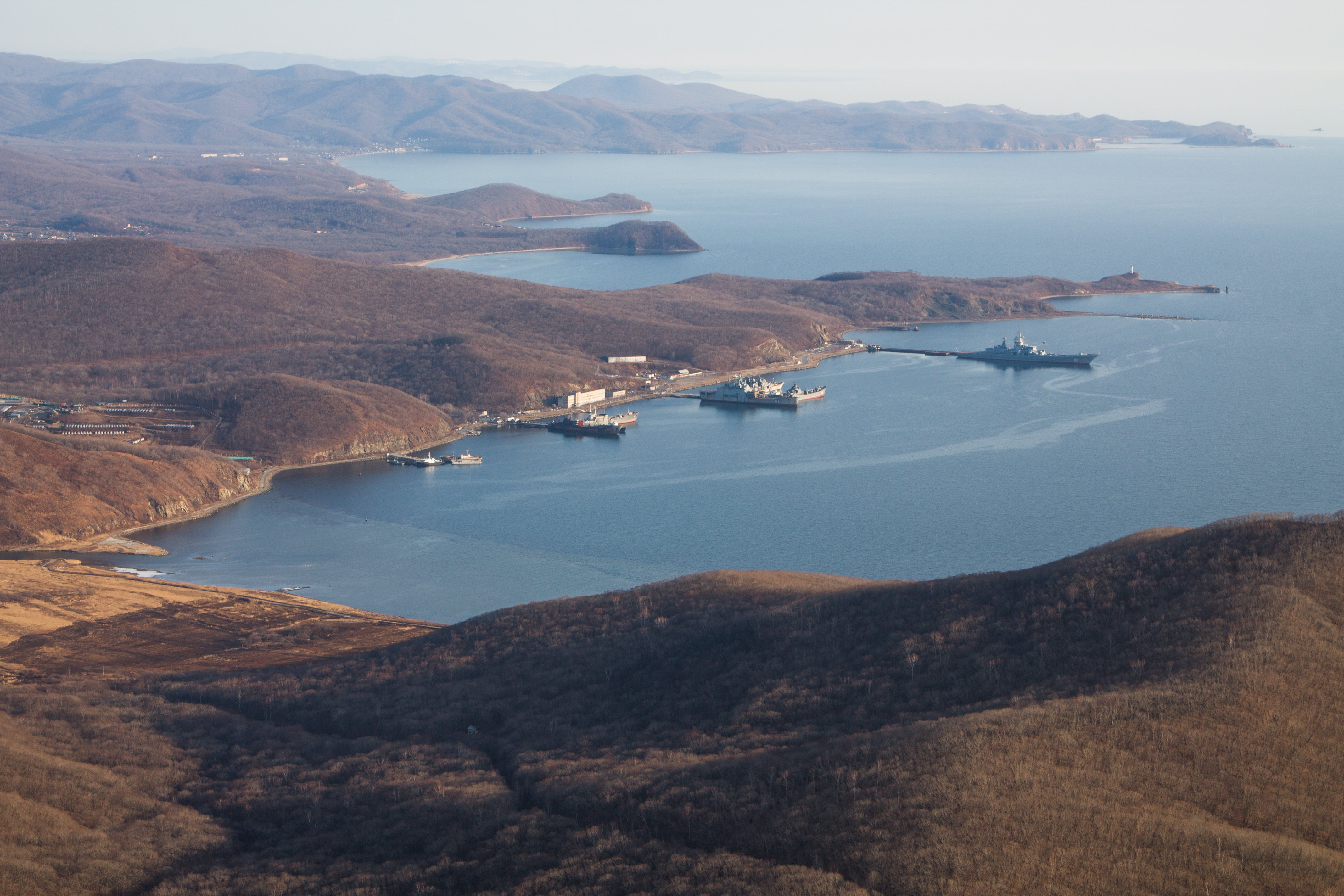 Бухта Абрек с горы Большой Иосиф